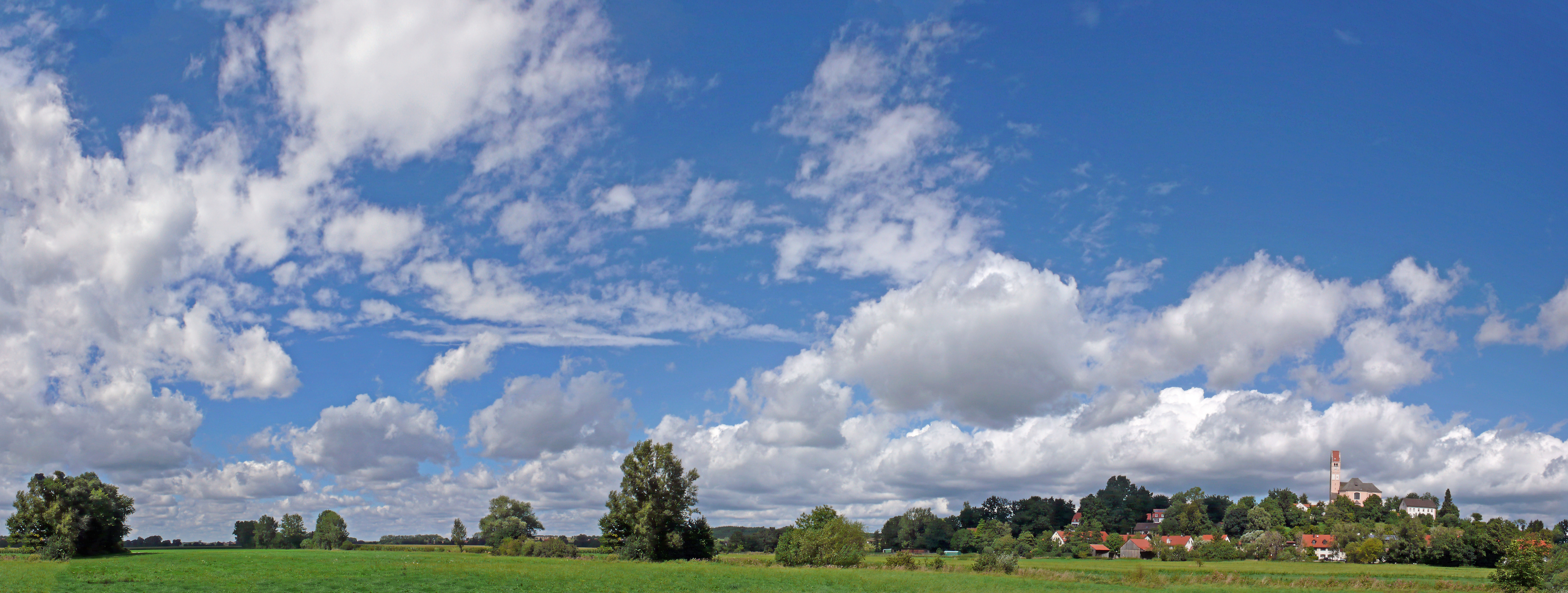 Bergkirchen im Spätsommer (Panorama)